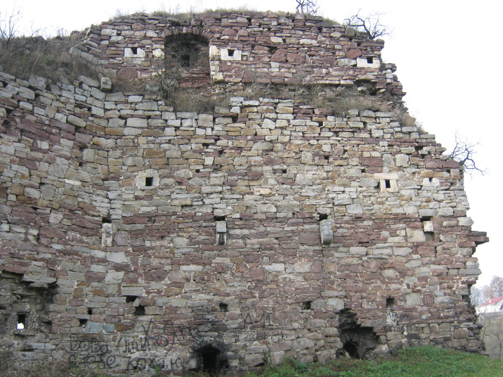 Залишок стіни. Фортеця. Бучач